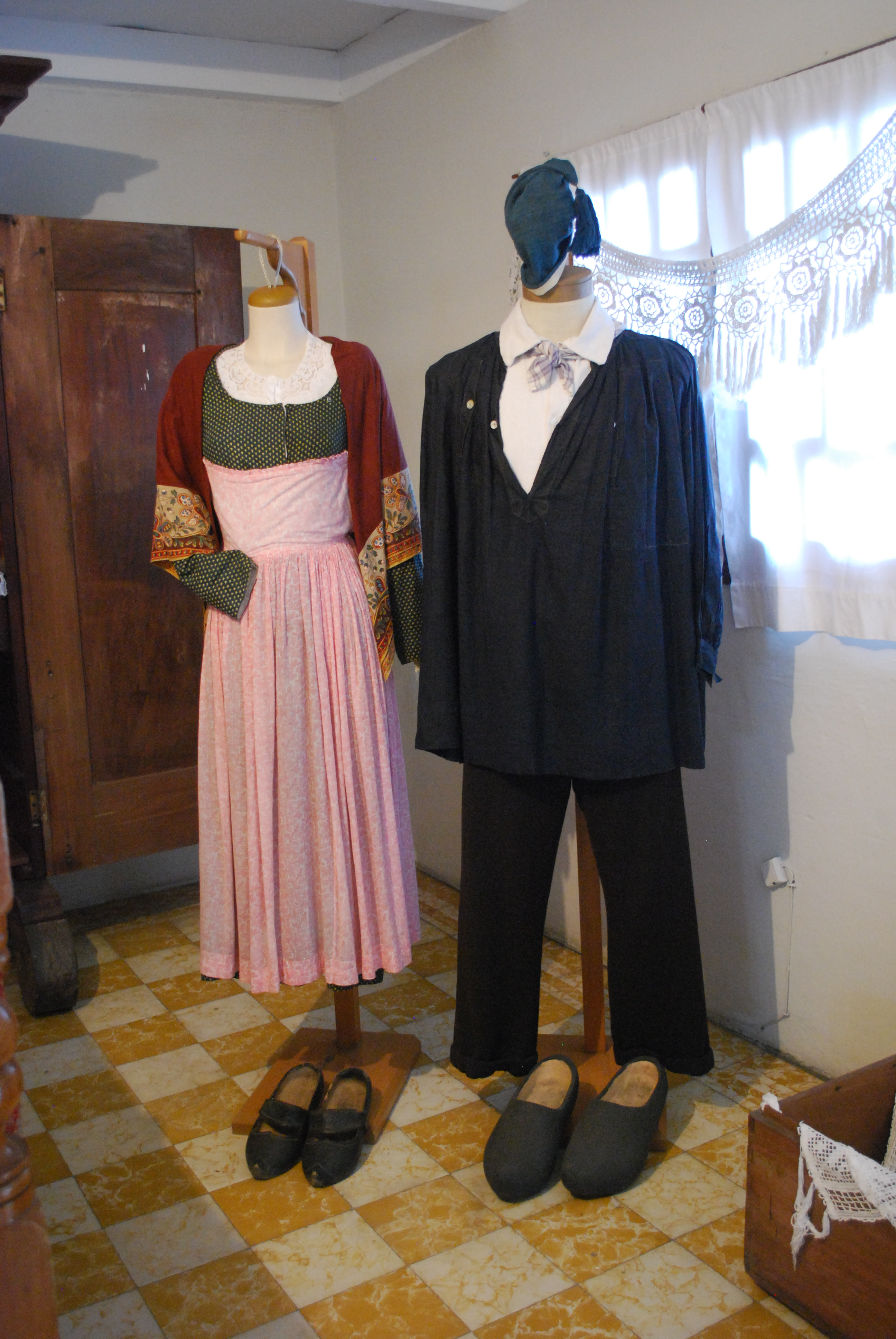 manequins with 19th century dress at the San Rafael Museum in San Rafael, Veracruz